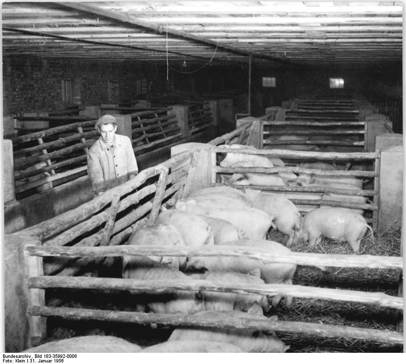 Bergholz, Bauer im Schweinestall Zentralbild Klein 31.1.1956 Ho-Qu. LPG "Neuland" wertet Beschlüsse der IV. LPG-Konferenz aus. Die Beschlüsse der IV. LPG-Konferenz helfen den landwirtschaftlichen Produktionsgenossenschaften, die Produktionspläne für 1956 richtig aufzustellen. Die LPG "Neuland" in Bergholz, Krs. Pasewalk, hat mit 72 (sieben zwei) Mitgliedern auf 270 ha (sieben zwei null) landwirtschaftlicher Nutzfläche bereits gute Erfolge erzielt. Aber es gibt doch noch verschiedene Schwächen, die die Genossenschaftsbauern durch die Verwirklichung der Beschlüsse der IV. LPG-Konferenz überwinden wollen. UBz: Die schwere Stallarbeit ist in der LPG "Neuland" noch nicht mechanisiert, nicht einmal in dem neuerbauten Schweinestall, in dem Lothar Paul in diesem Jahr 270 (zwei sieben null) Schweine mästet."